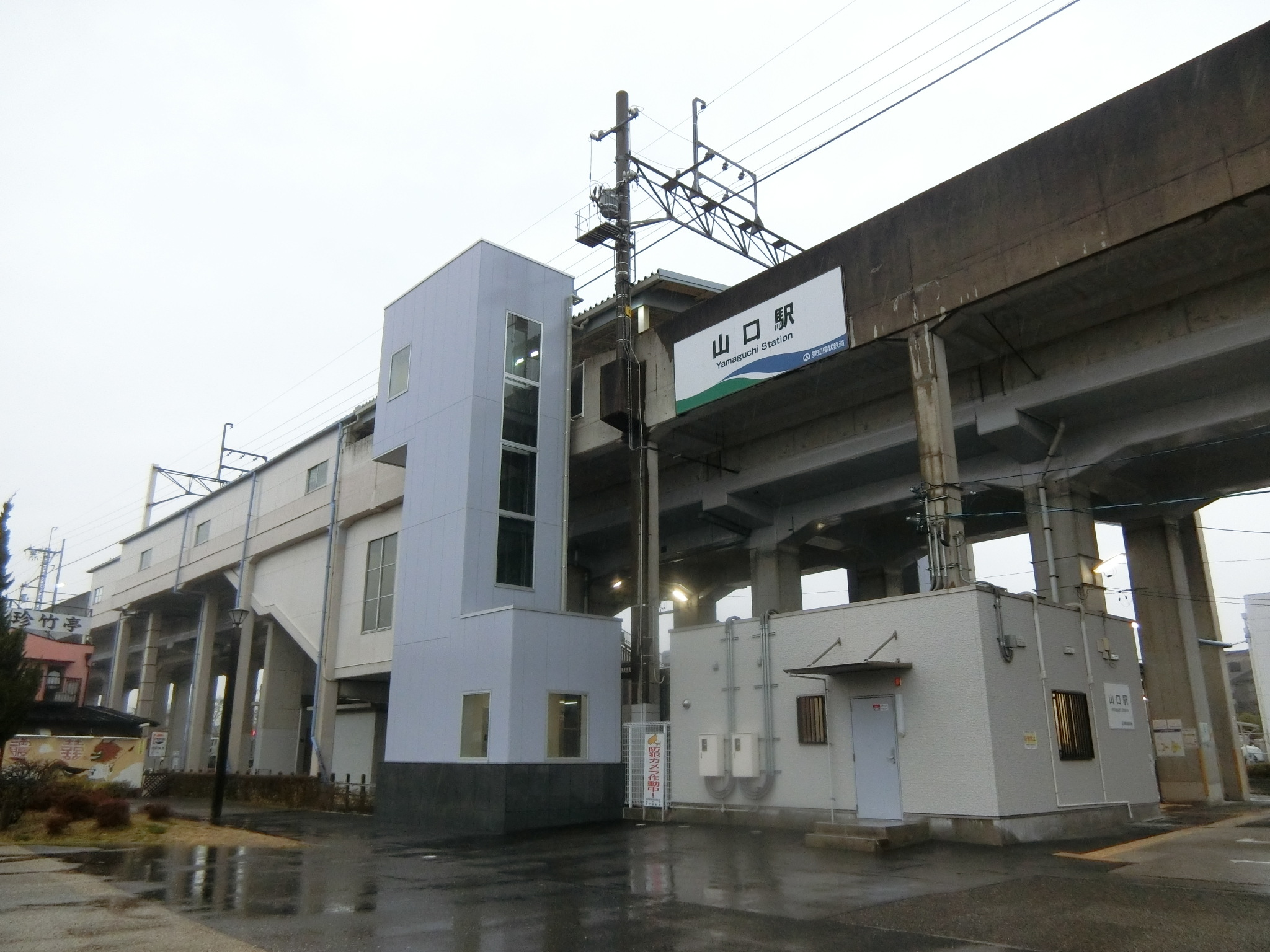 愛知環状鉄道山口駅